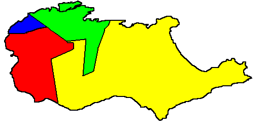 Darkdragon